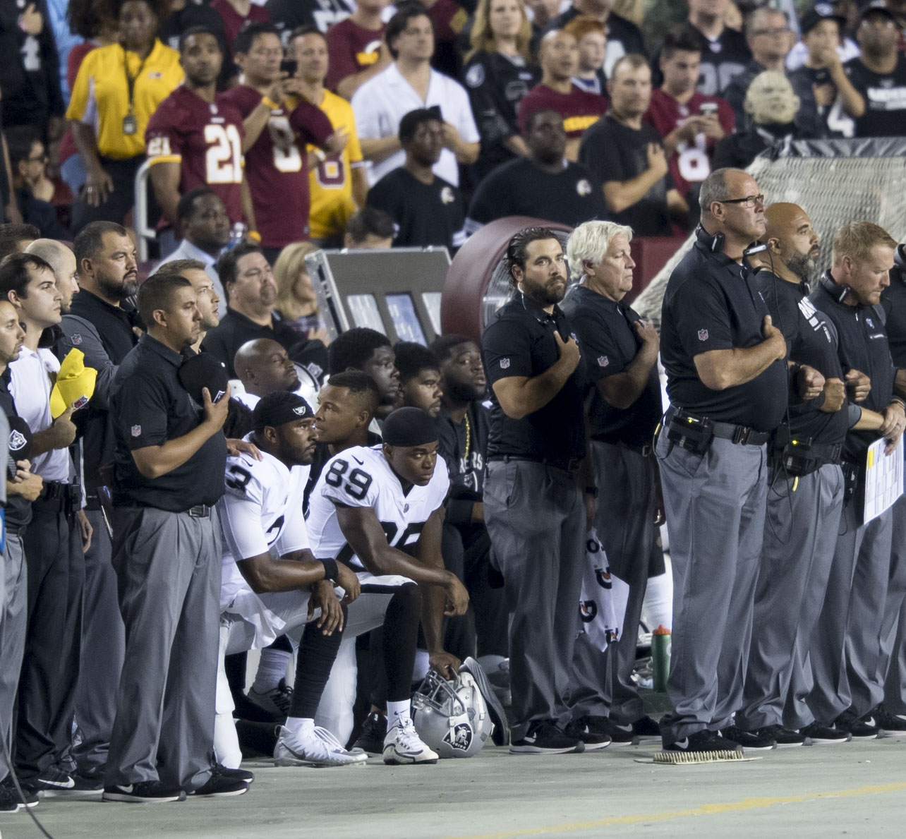 Raiders at Redskins 9/24/17